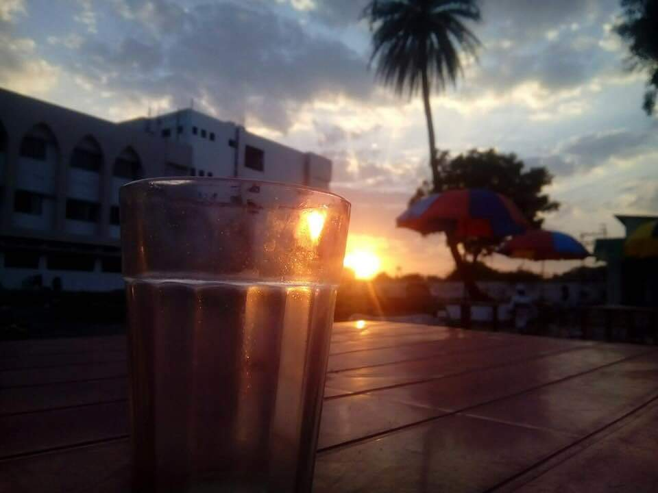 صورة ملتقطة من مقصف كلية الهندسة بالجامعة المحمدية عند غروب الشمس